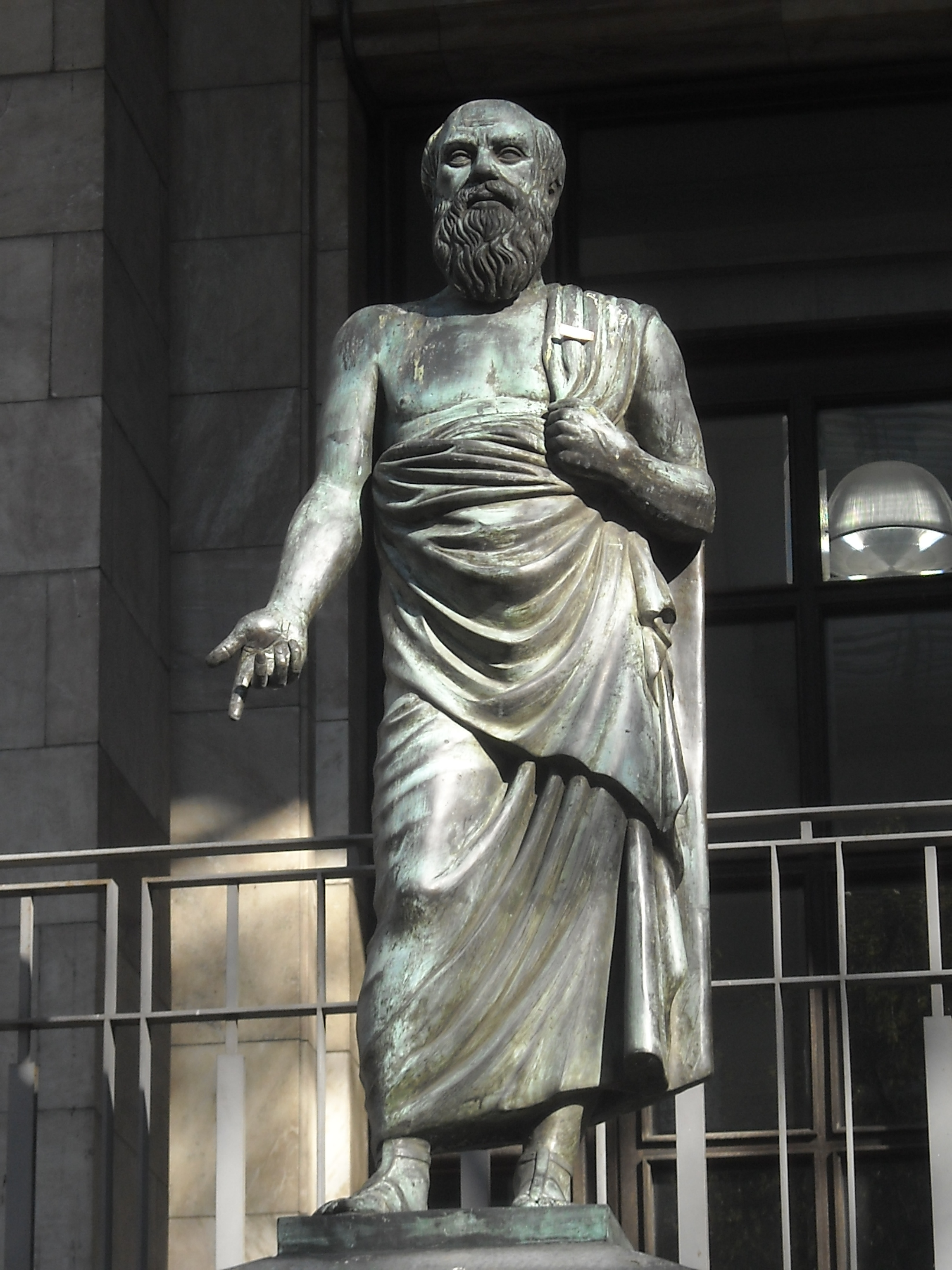 Sócrates. Ubicada en el departamento de Montevideo